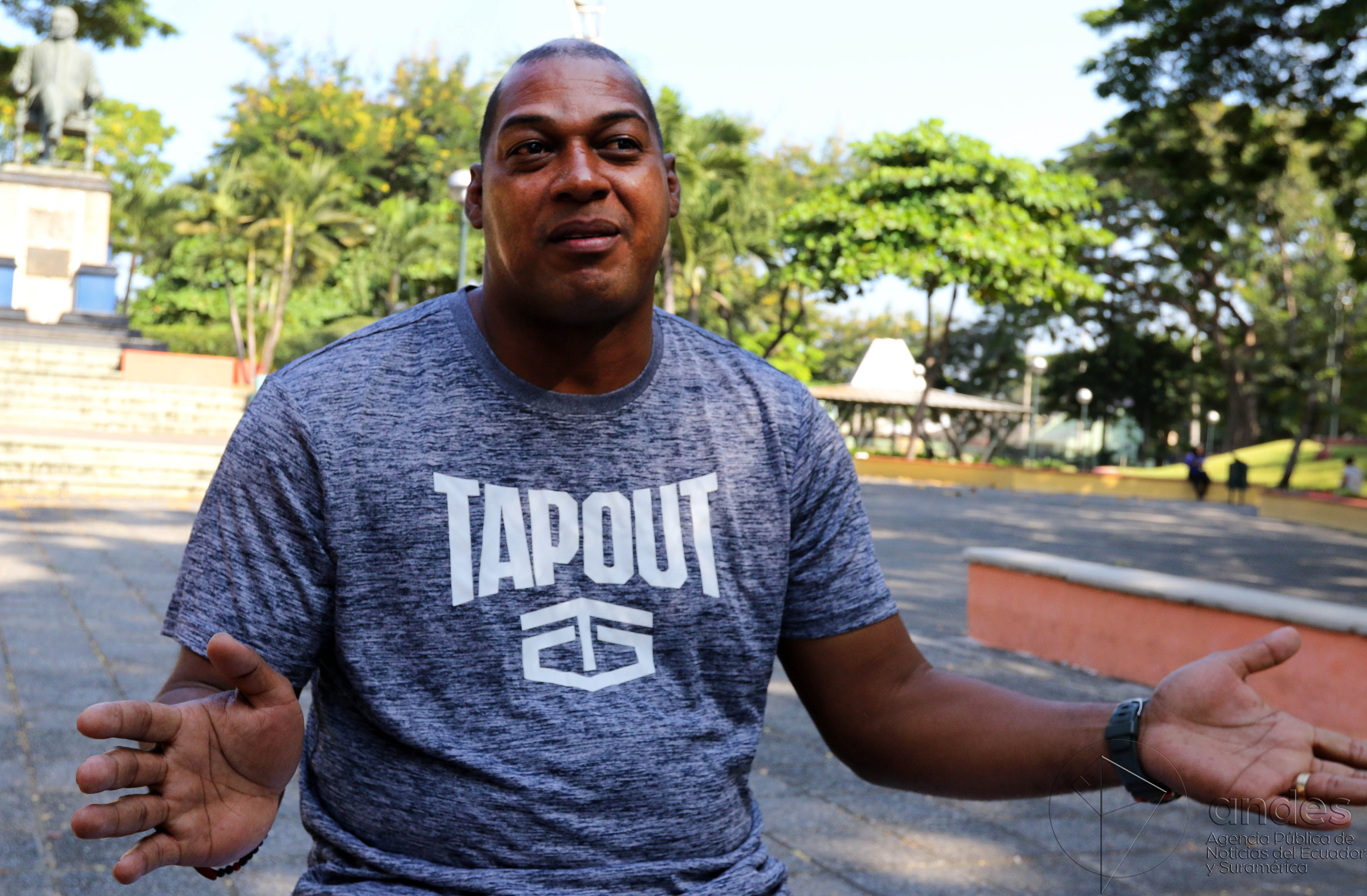 Guayaquil, miércoles 15 de junio del 2016 (Andes).-Eduardo "Tanque" Hurtado exjugador de la selección ecuatoriana de fútbol, recuerda su participación en el partido frente a EEUU en la Copa America que se realizó en Ecuador. Foto:Andes/César Muñoz